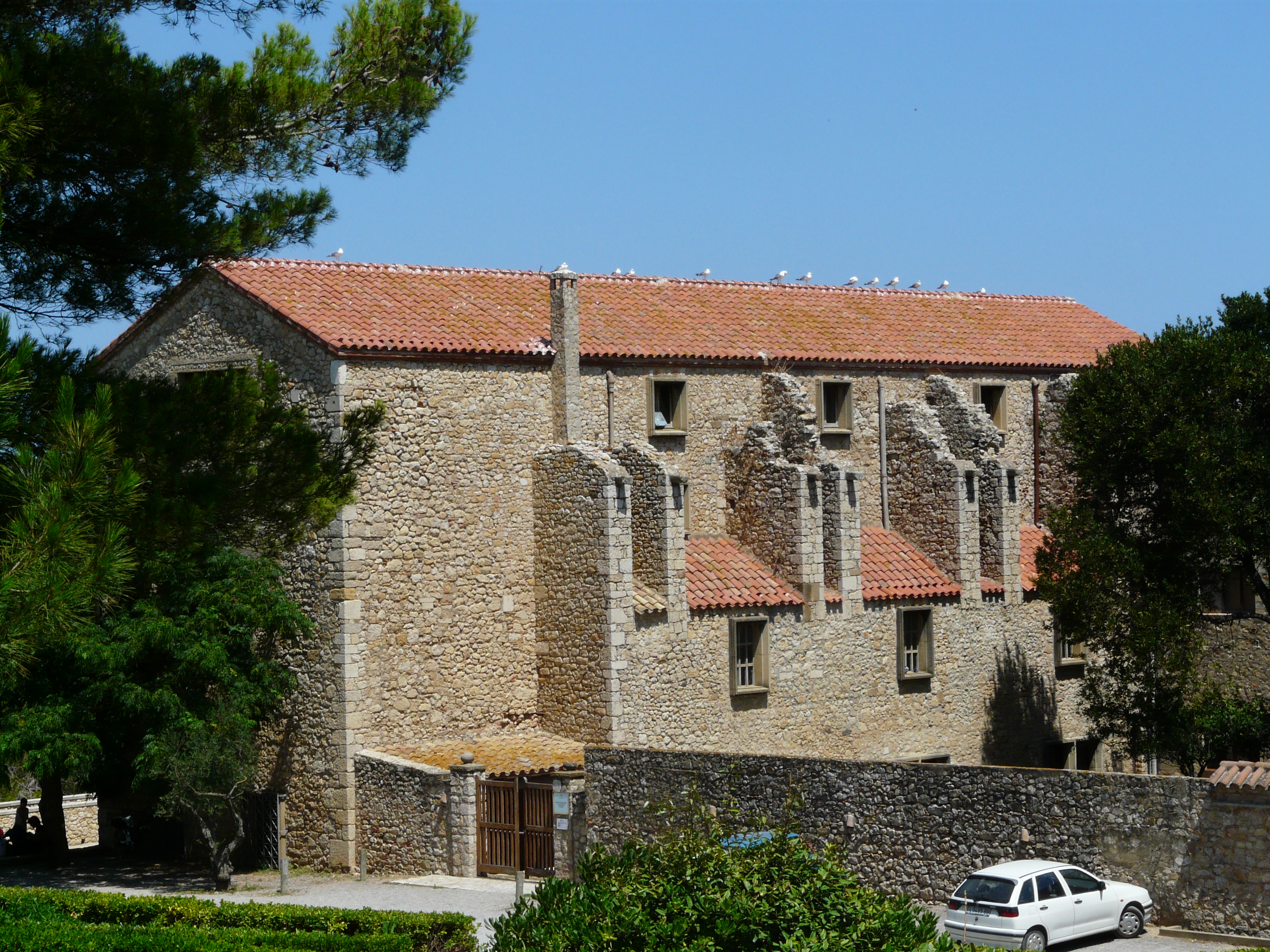 Convent Santa Maria de Gràcia (l'Escala) Object location42° 08′ 06.42″ N, 3° 07′ 11.33″ E